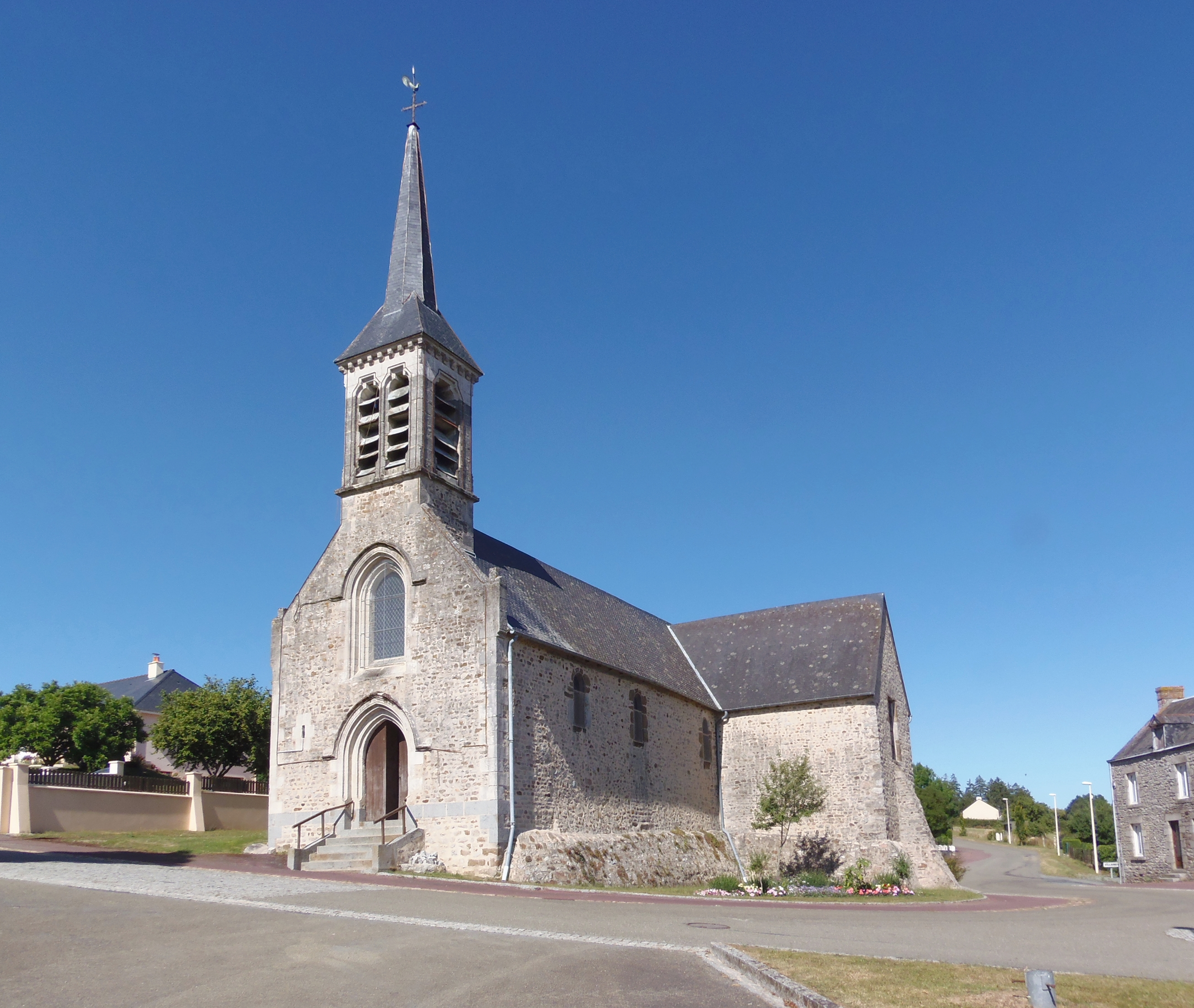 Crennes-sur-Fraubée (Pays de la Loire, France). L'église Saint-Calais.